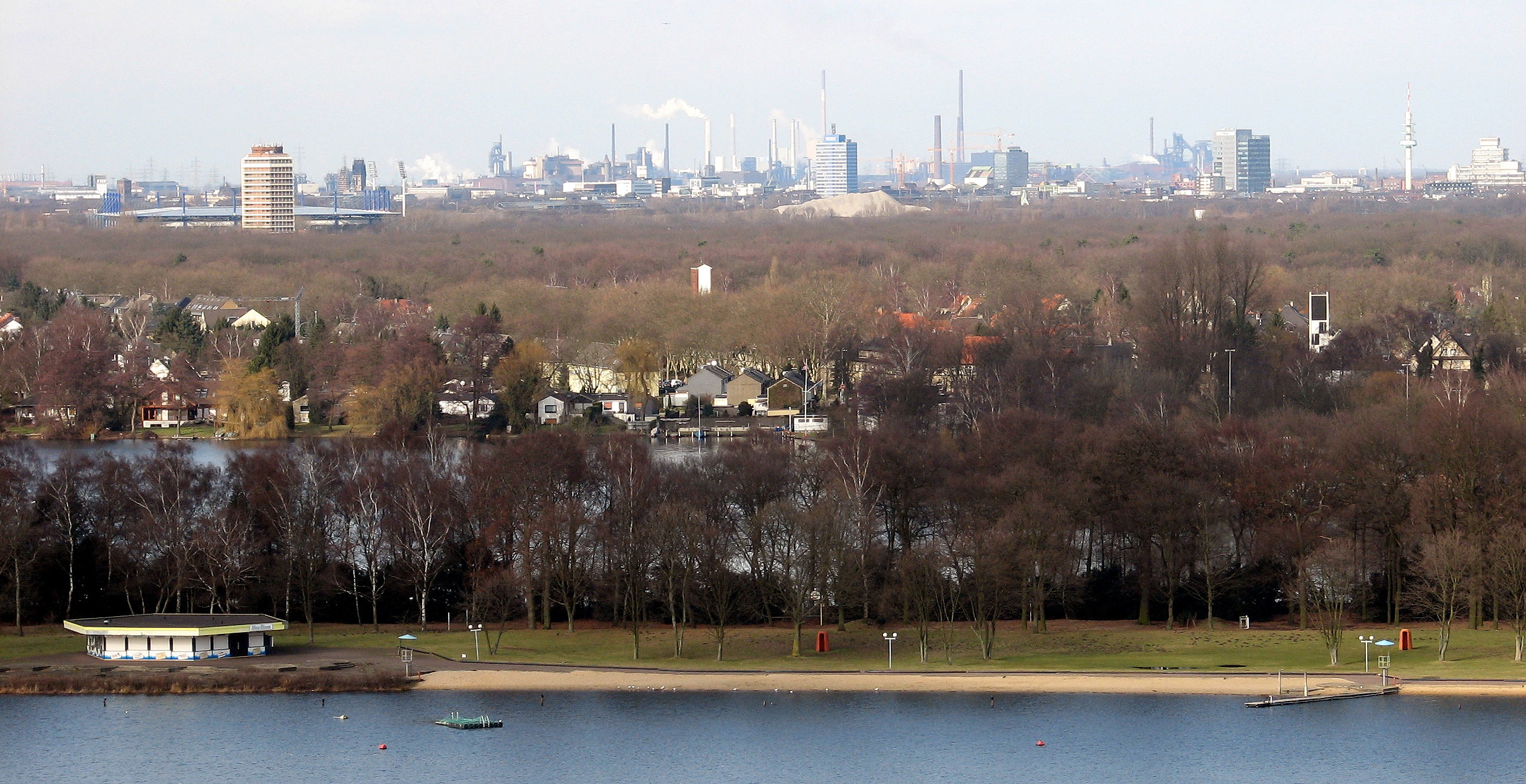 Überblick über Duisburg, Salvatorkirche_(Duisburg), MSV-Arena, Sechs-Seen-Platte, Sportschule Wedau im Sportpark Wedau und die Industrie im Norden